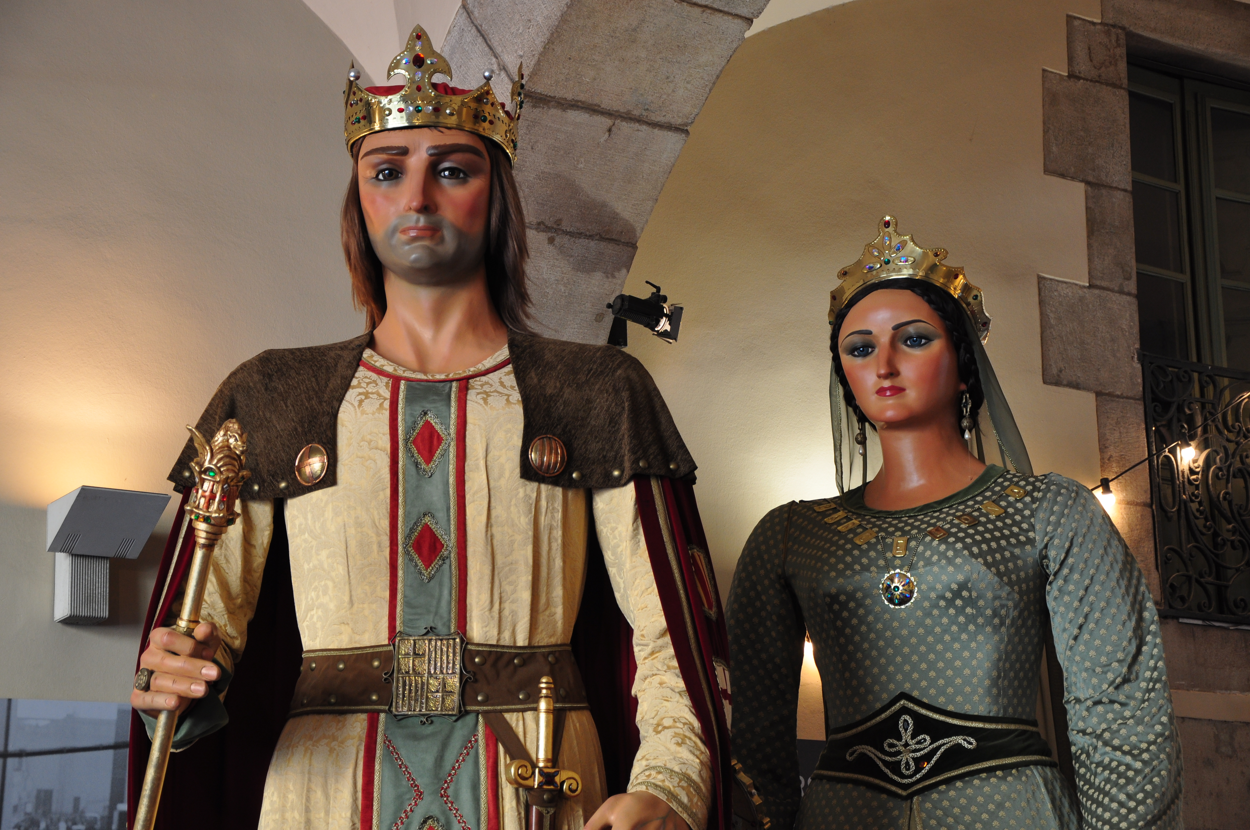 Mercè 2012. Els gegants de la ciutat de Barcelona, Jaume I i Violant d'Hongria, al Palau de la Virreina